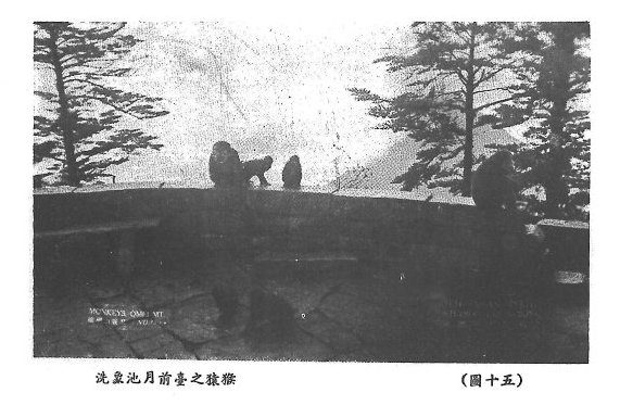 中文（台灣）: 峨眉山老照片